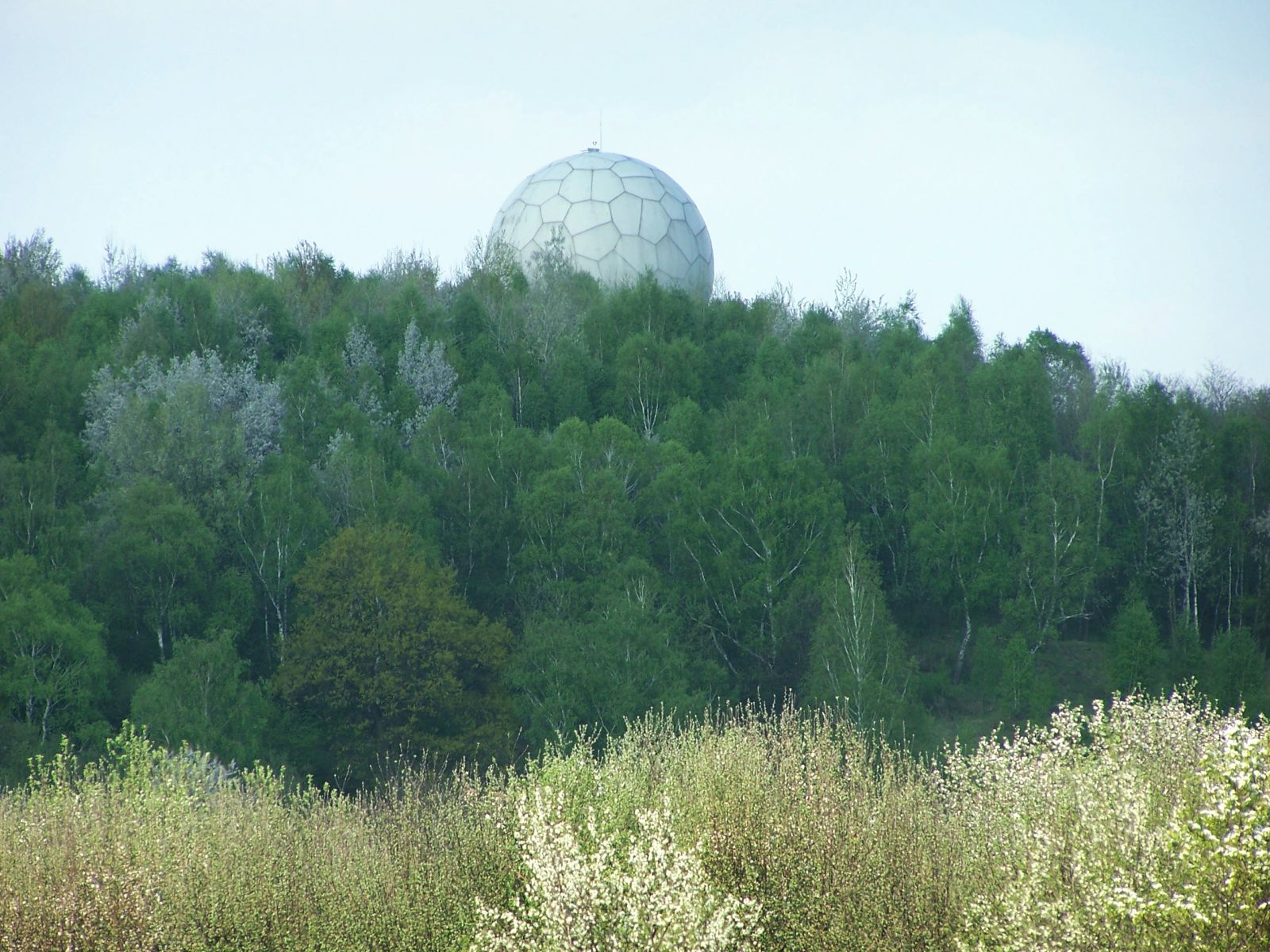 Radar lotniska Balice na szczycie Popówki. Widok z Lasu Wolskiego w Krakowie